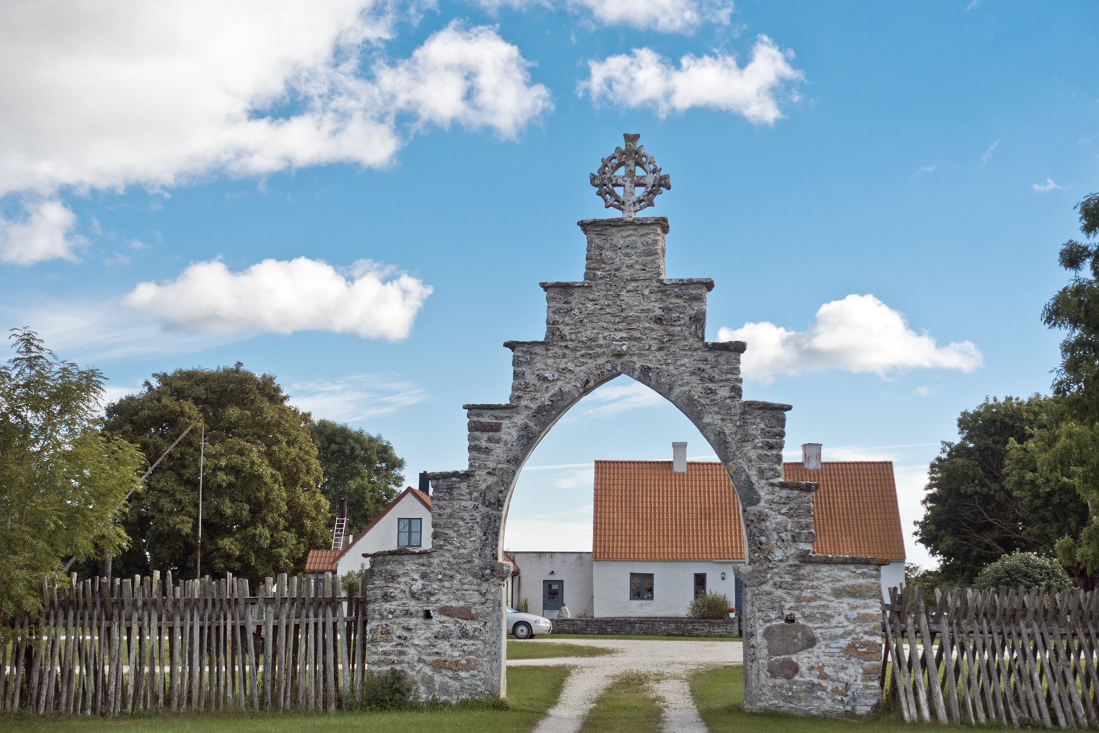 Fornsök: Gårdsport, kalksten, ca 8 m h, 7 m br och 1 mtj. Trappstegsgavel krönt av ringkors med genombruten krans. Ca 20 m N 15cg Ö därom och VNV om dåvarande landsvägen finns på ek kartan från 1940 en R -markerad fornlämning, vilken dock ej kunde återfinnas 1977.